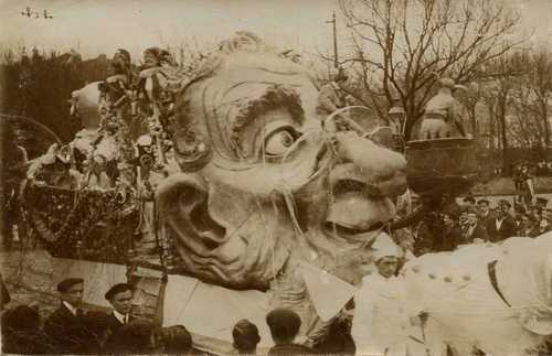 Karroza Donostiako inauterian.